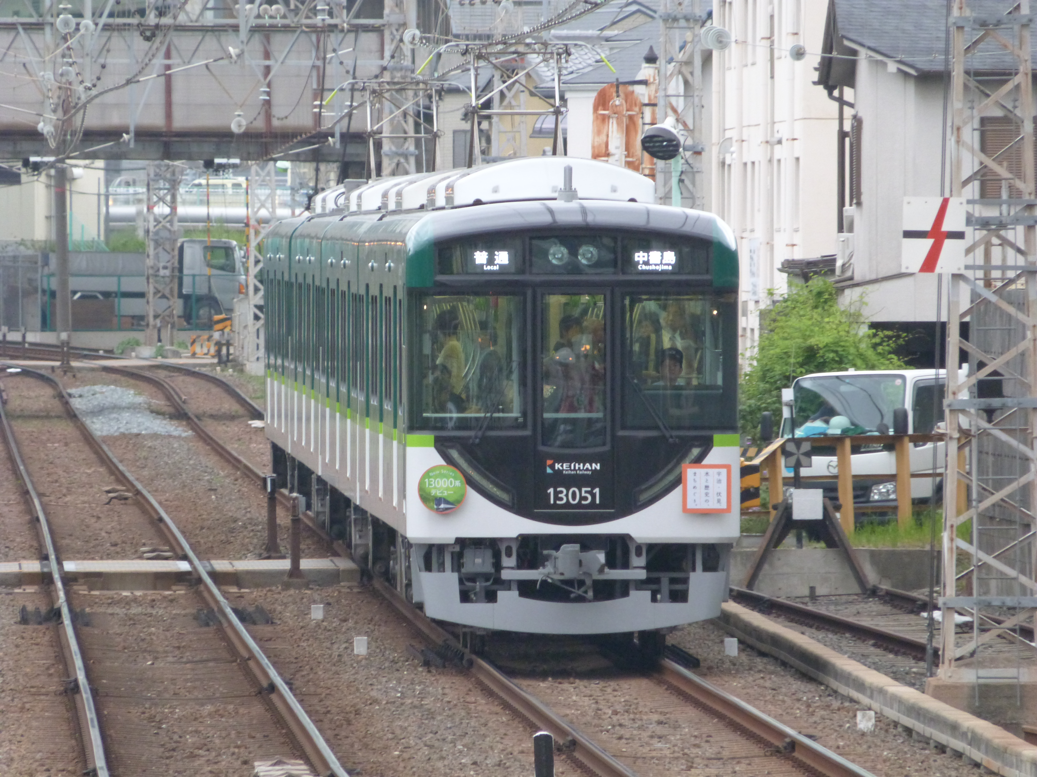 京阪中書島駅に進入する130001編成。